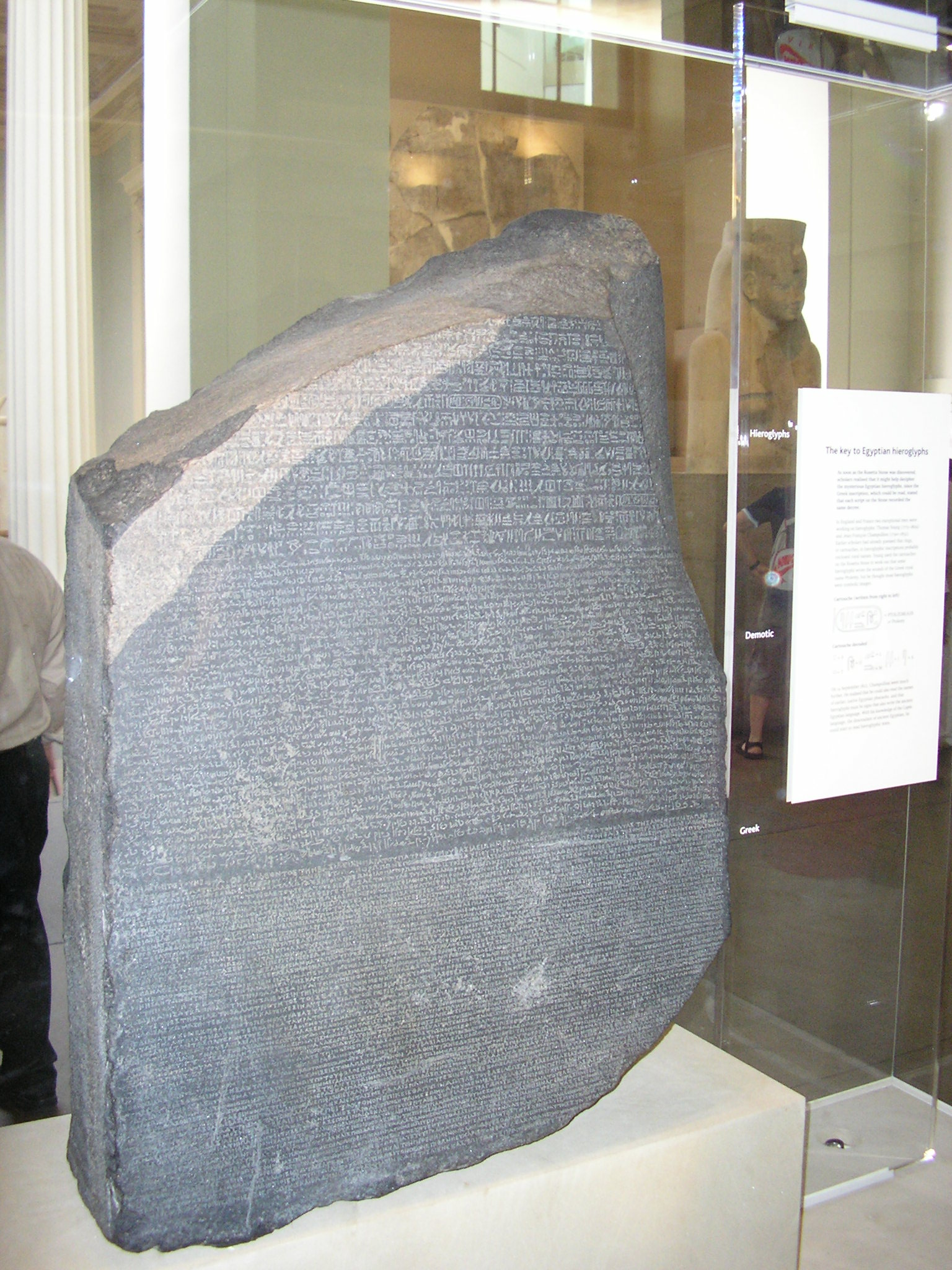 La Piedra Rosseta, en el Museo Británico.